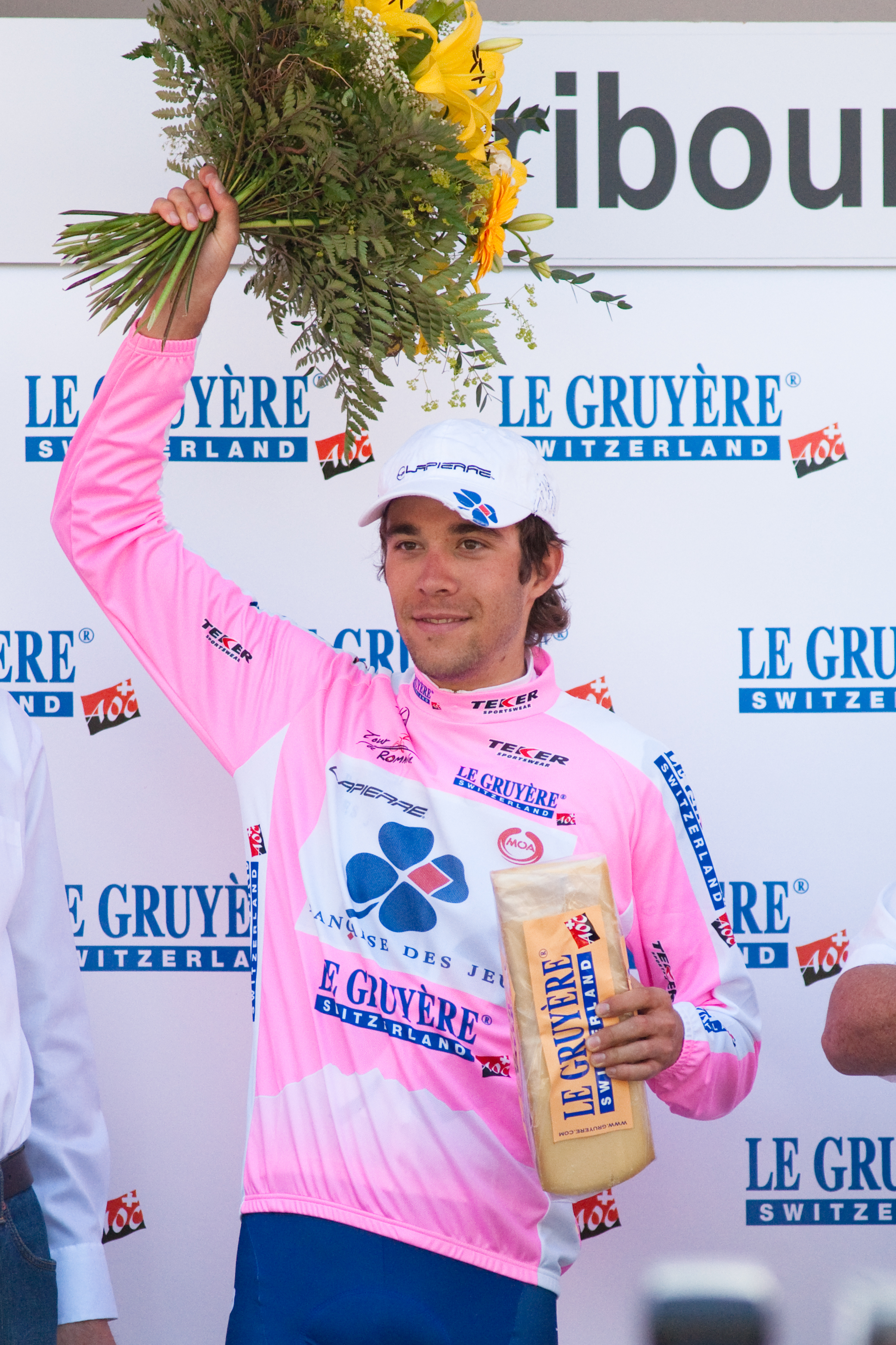 Thibaut Pinot sur le podium (meilleur grimpeur) de la seconde étape du Tour de Romandie 2010